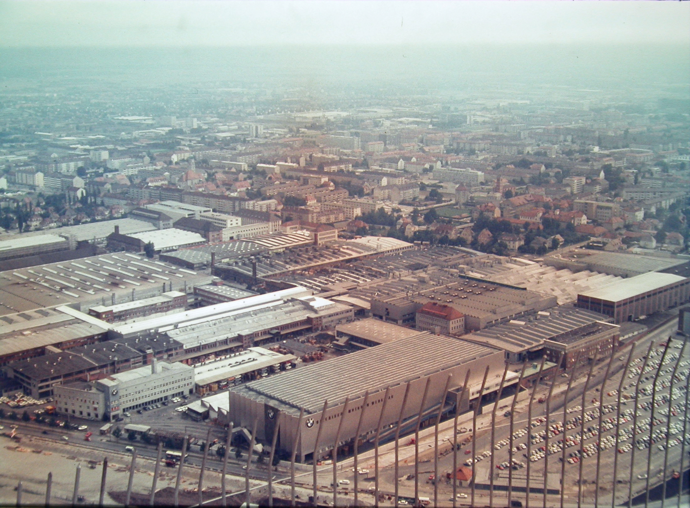 1969 - BMW-Werk München